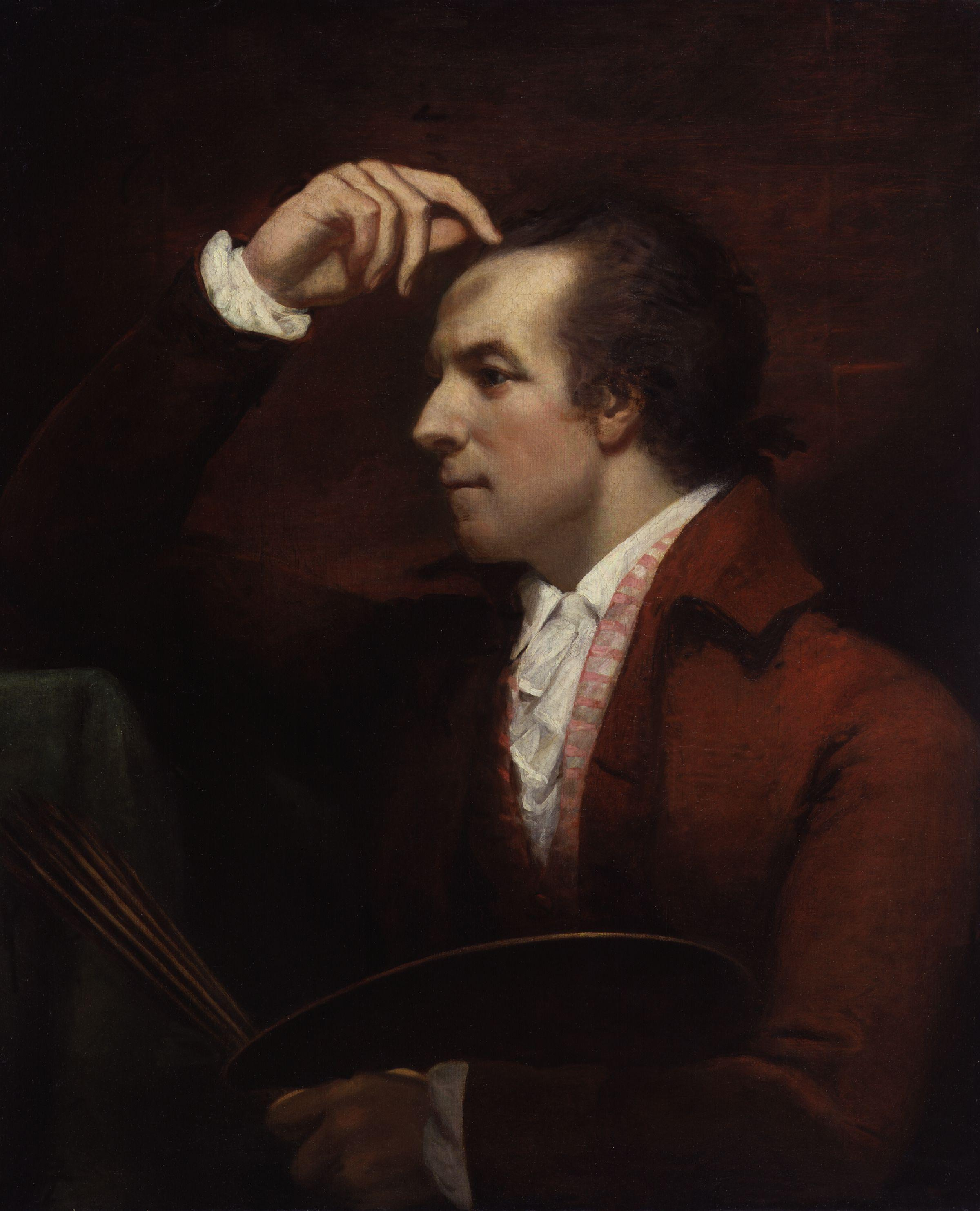 Self-portrait